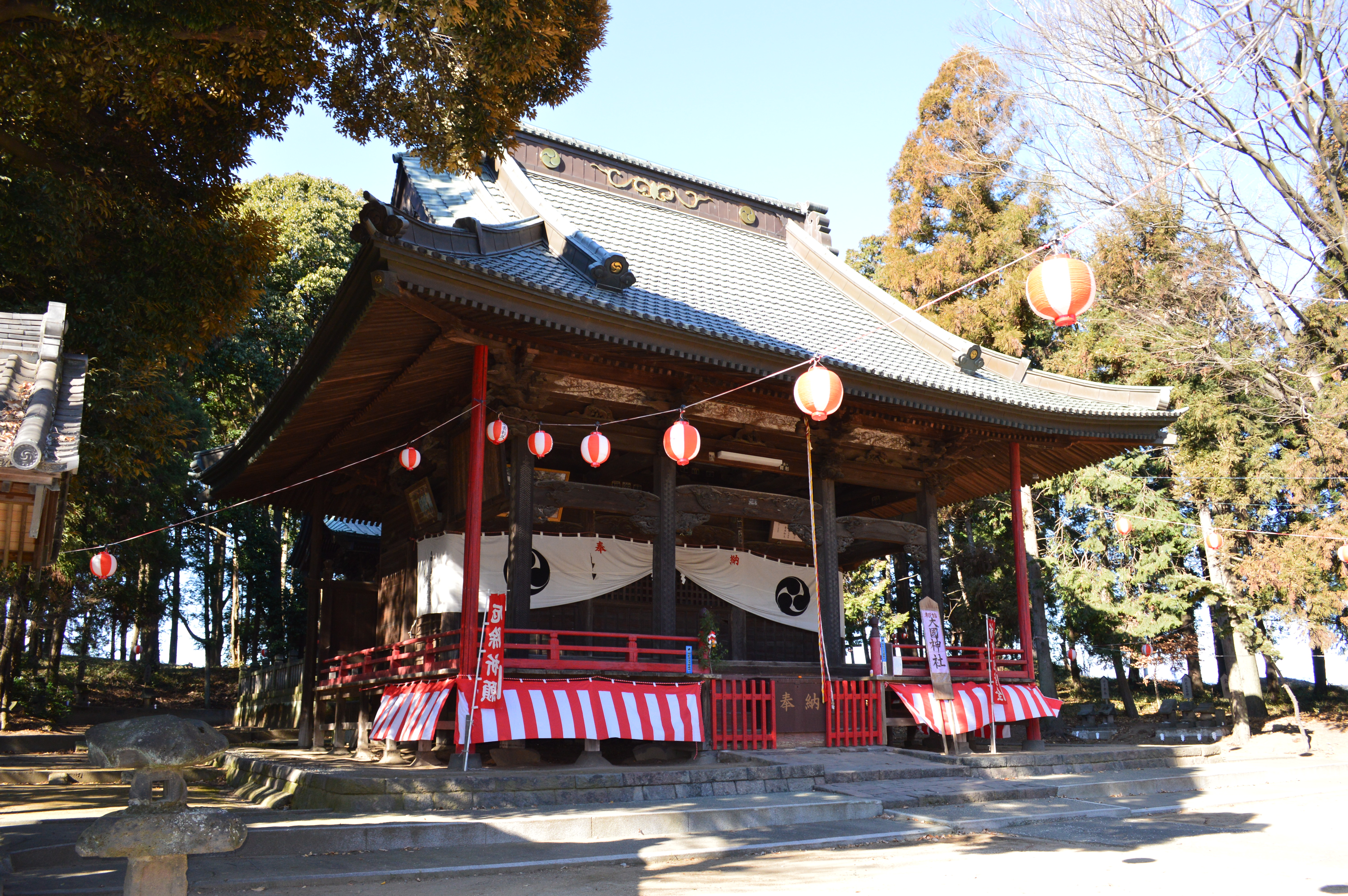 大國神社 (伊勢崎市) 拝殿